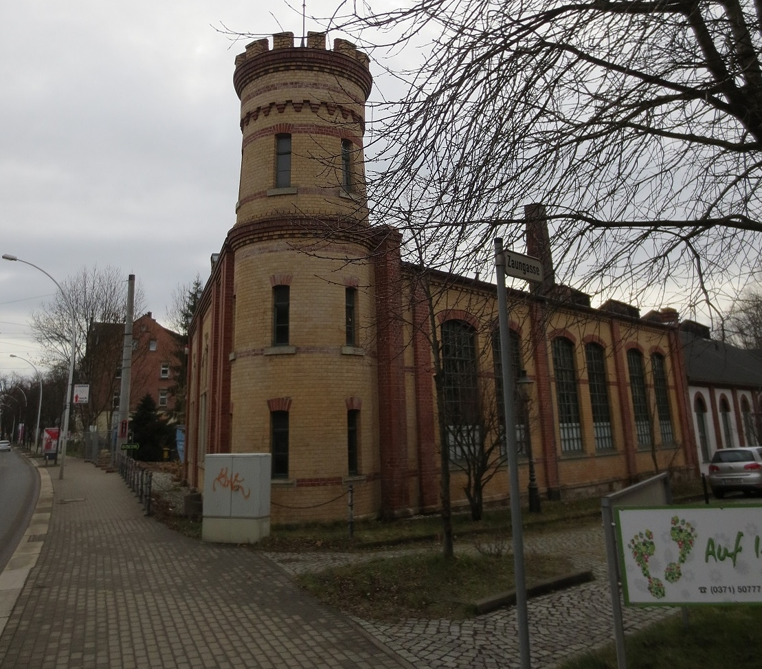 Kulturdenkmal Chemnitz Altchemnitz. Heute Gewerbe.